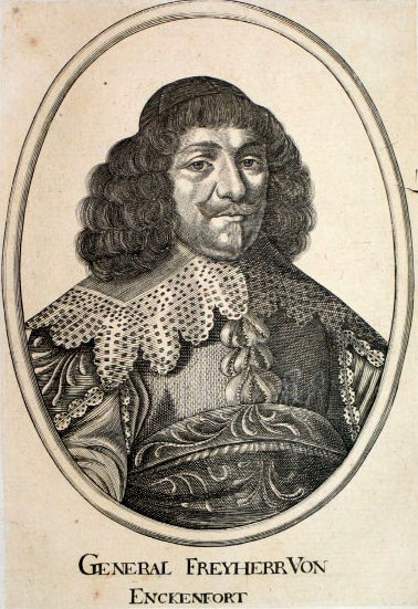 General Freyherr von Enckenfort (in alter Schreibweise) - Kupferstich (heutige Schreibweise: Adrian von Enkevort) Datum: um 1650 Urheber: unbekannter Kupferstecher Quelle: Bildlink